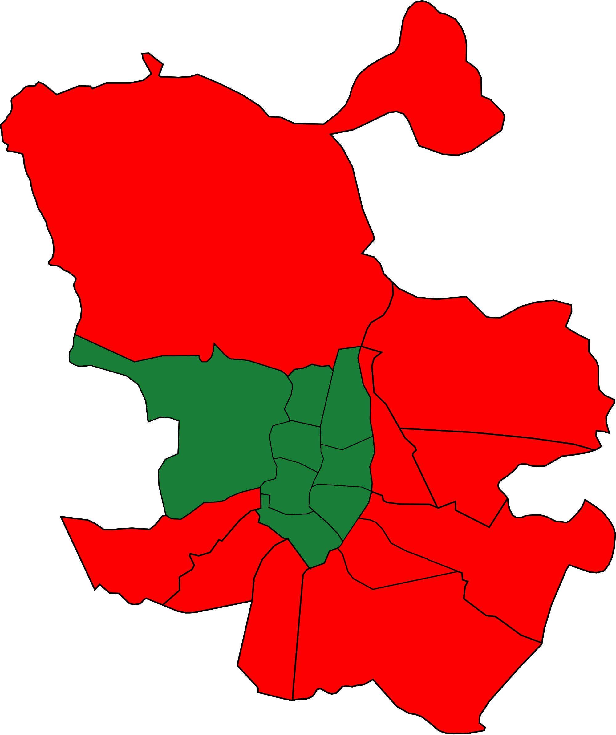 Lista más votada en cada uno de los 18 (entonces) distritos de Madrid en las elecciones municipales de 1983. Partido Socialista Obrero Español Union de Centro Democratico (1983). "El voto por distritos". Villa de Madrid. Informativo quincenal (28): 6-7. Madrid: Ayuntamiento de Madrid. ISSN 9968-2133.